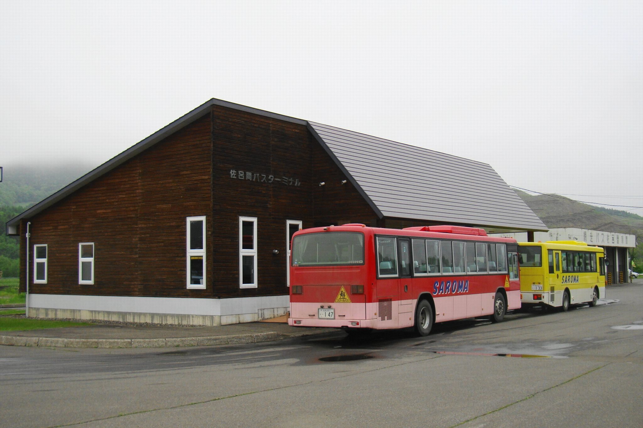 Saroma Bus Terminal